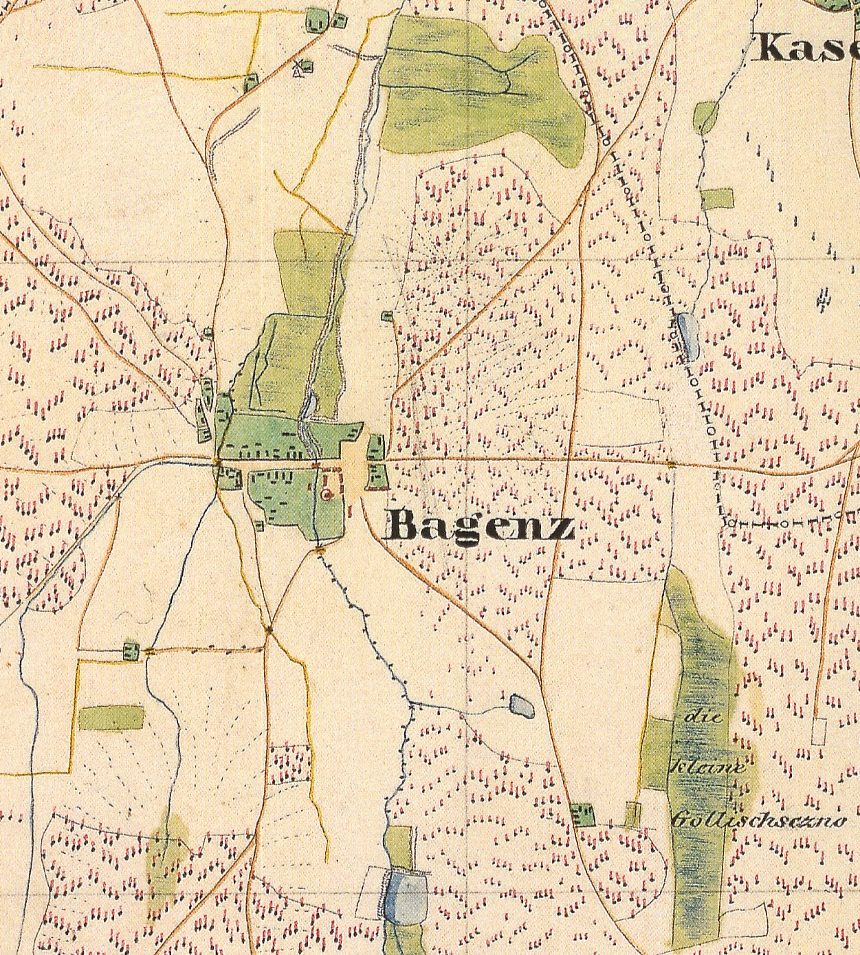 Bagenz, Ortsteil der Gemeinde Neuhausen/Spree, Landkreis Spree-Neiße, Brandenburg, Ausschnitt aus dem Urmesstischblatt 4352 Sellessen von 1845